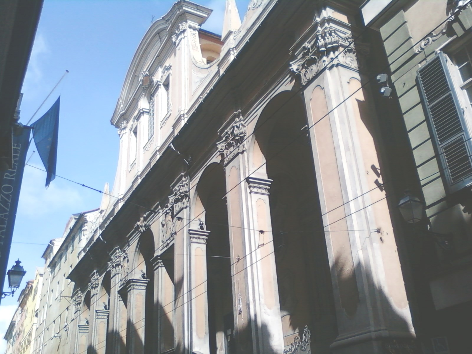 Chiesa dei SS Vittore e Carlo e N.S. della Fortuna in Genova (Italy)